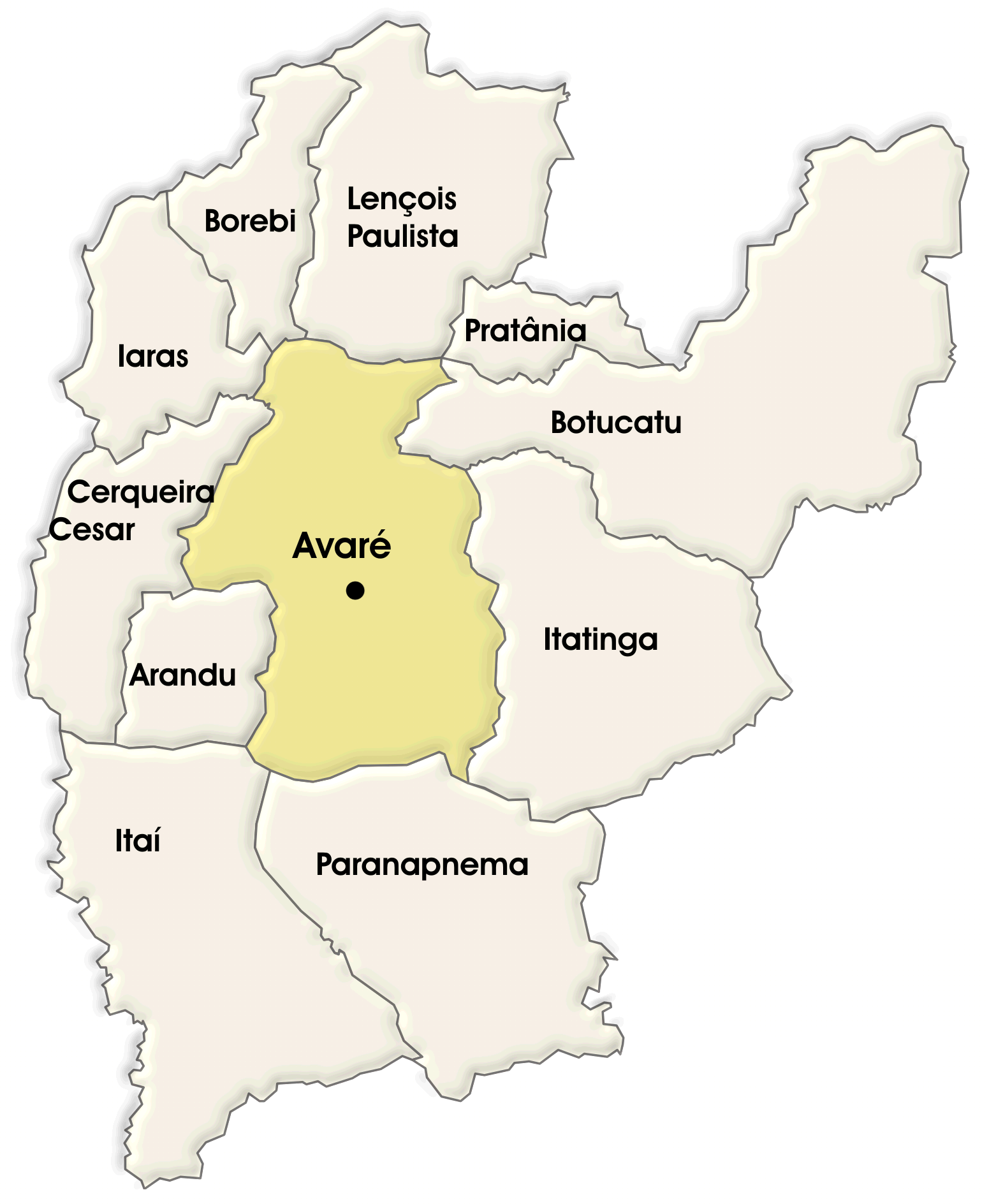 Informação: Municípios vizinhos a Avaré, estado de São Paulo, Brasil Descrição: 3Dmap Data: 21 de setembro de 2006 Autor: GronkOkara